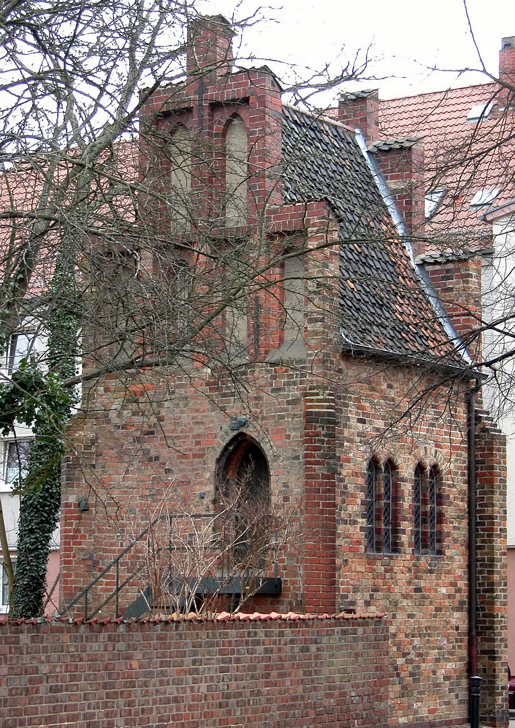 Braunschweig, Liberei: Rück- (Norden) und Westseite.